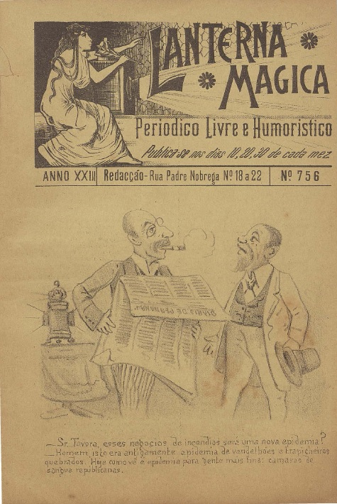 Capa de "Lanterna mágica: periódico livre e humorístico", ano 23, n. 756, 29 fev. 1904. Recife (PE), Brasil.